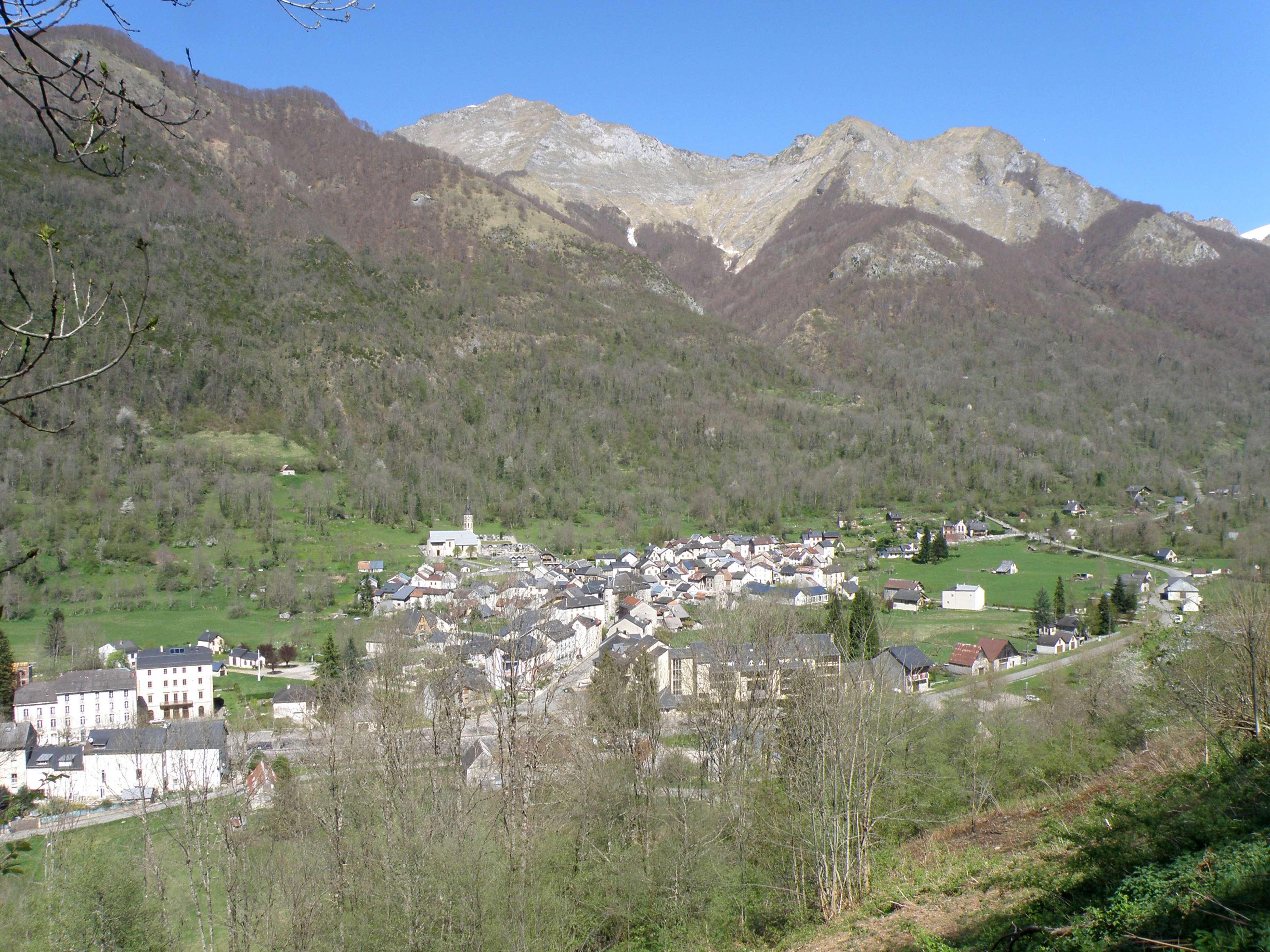 Aulus-Les-Bains (Ariège) vue depuis la route vers Guzet-Neige